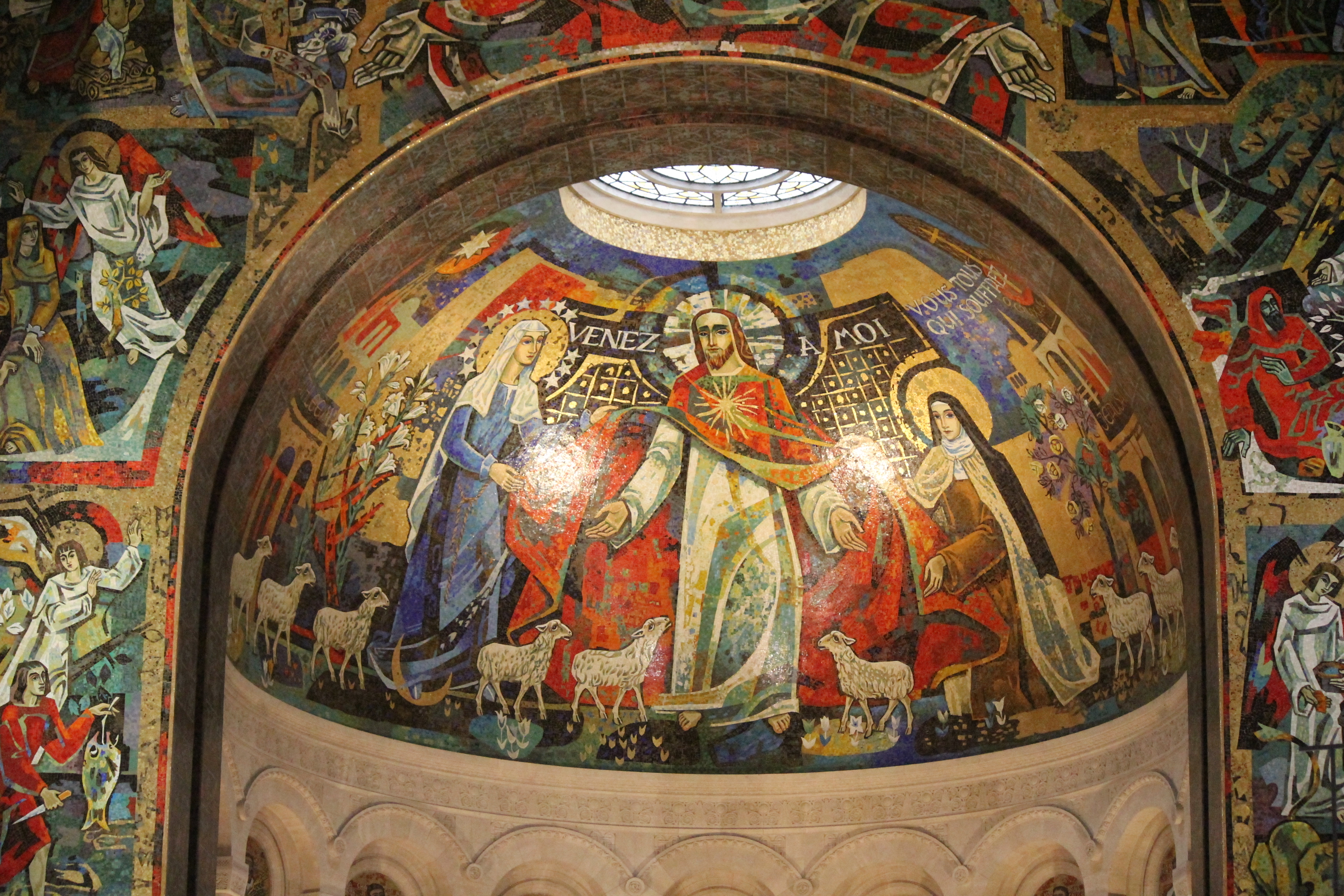 Basilique Sainte-Thérèse de Lisieux (14)